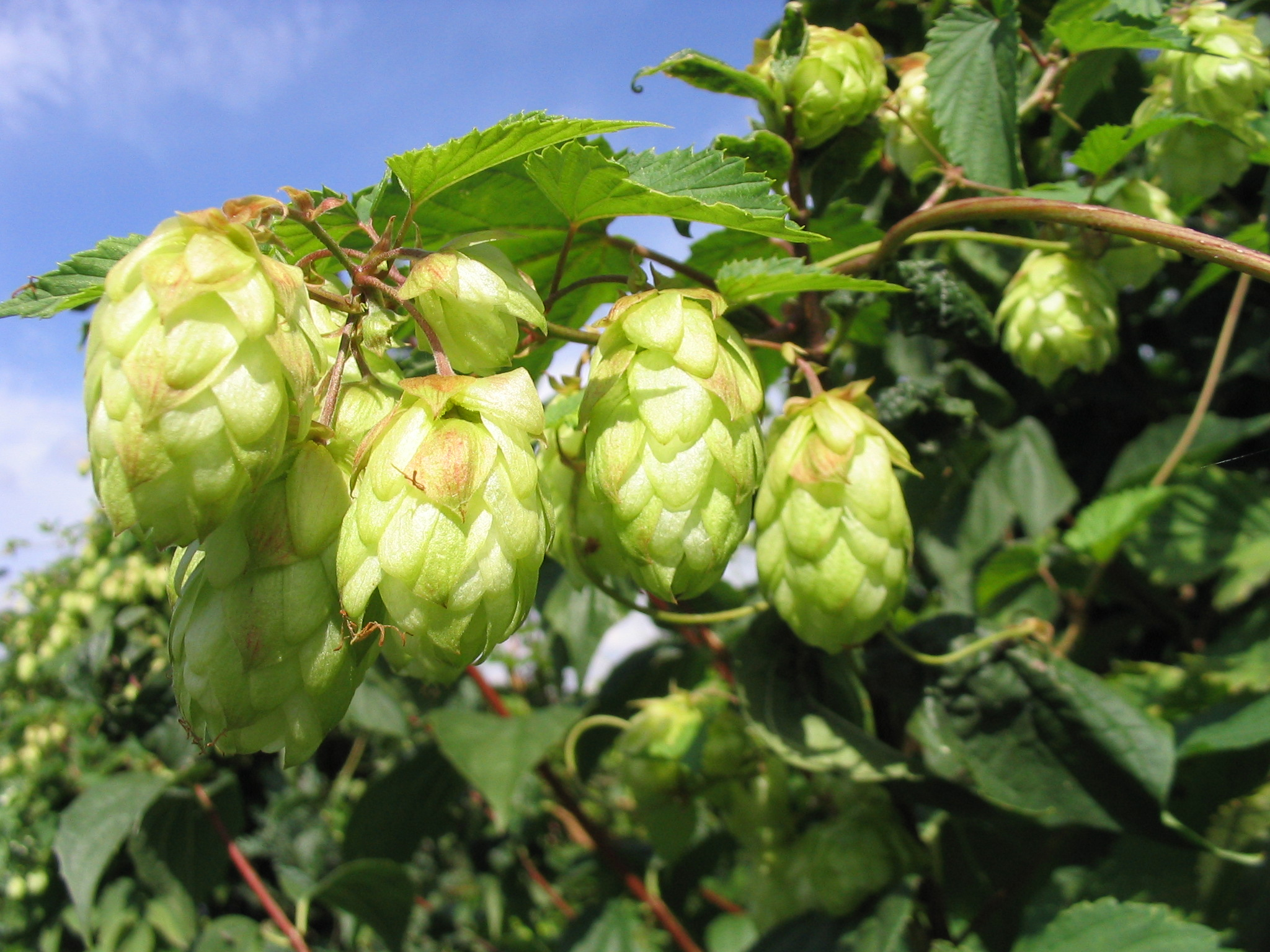 Fruchtstand von Wildem Hopfen, Humulus lupulus, fotografiert am 22.08.2004 Fotograf: Dr. Hagen Graebner